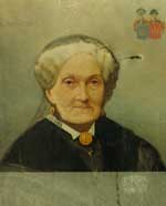 Ленскі Зянон. Партрэт Схаластыкі Карказовічавай з роду Уняхоўскіх. Другая палова 1880-х гадоў. Палатно, алей. 62 х 51. Справа ўверсе: гербы Ленскіх і Карказовічаў. НМГіК, Мінск.